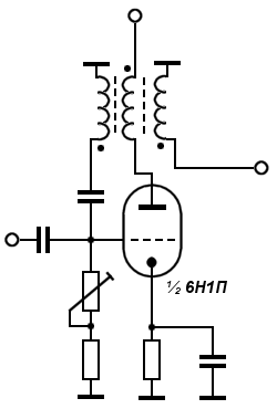 Schaltung eines Sperrschwingers (Blocking Generator) mit einer Triode